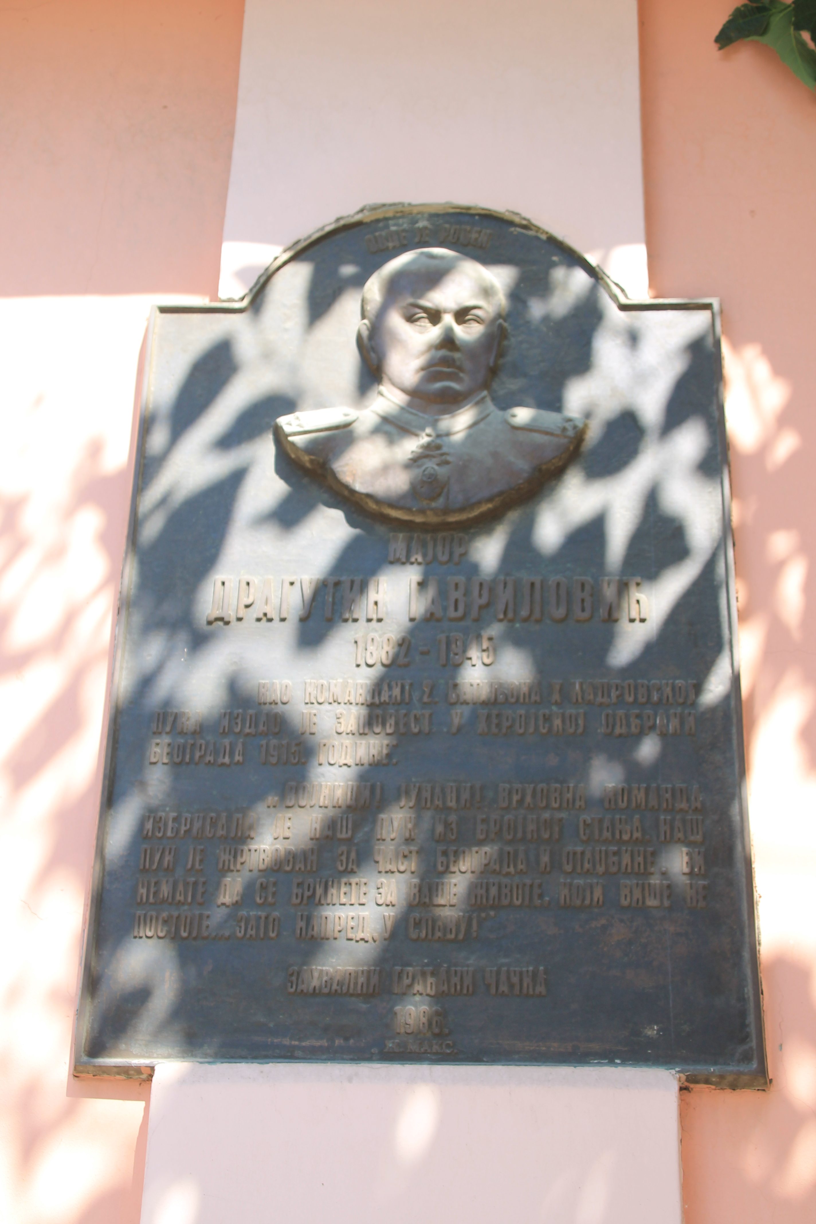 Ulica Cara Lazara (Čačak)